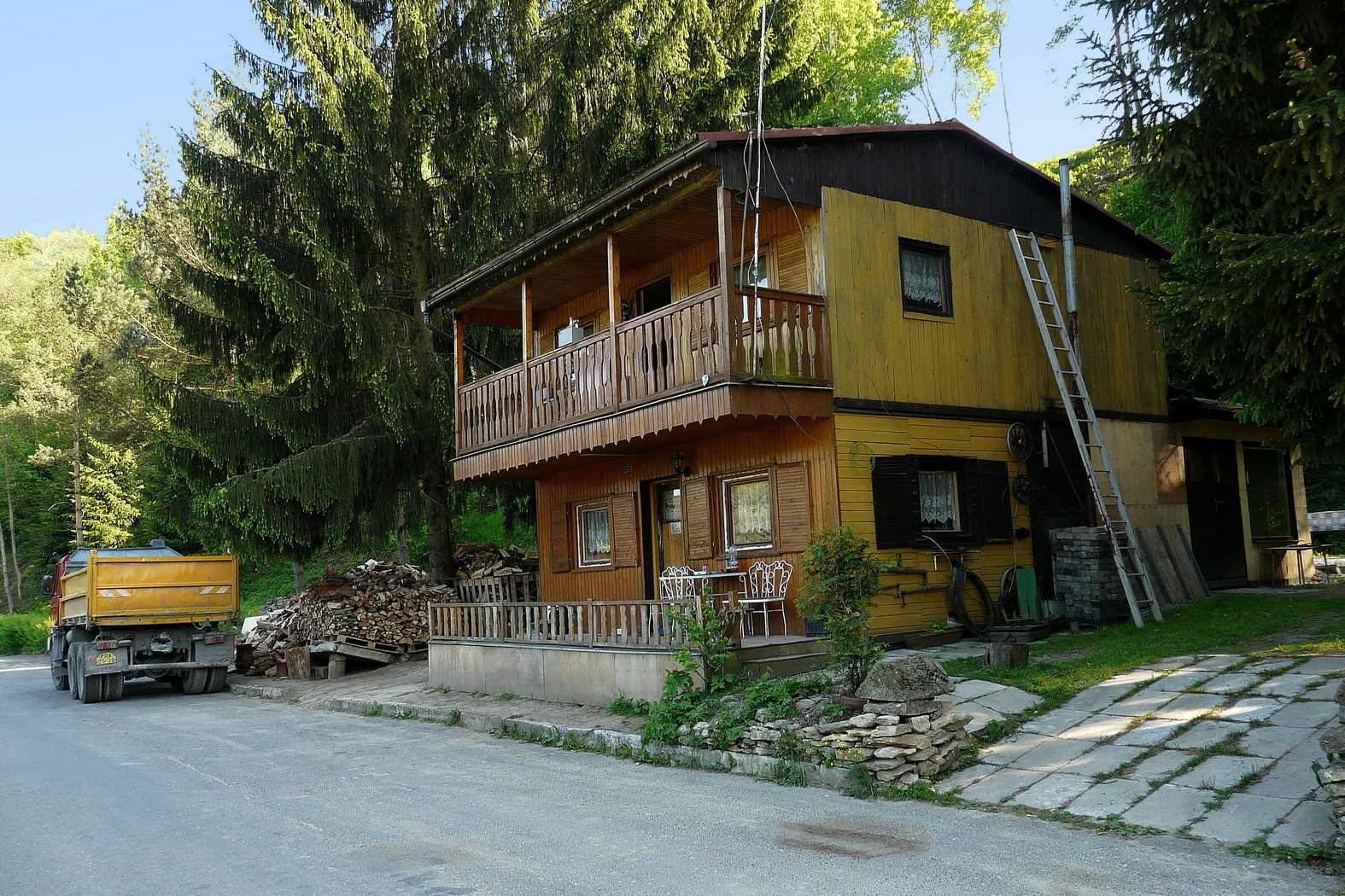 Občasné osídlení v Jablonečku